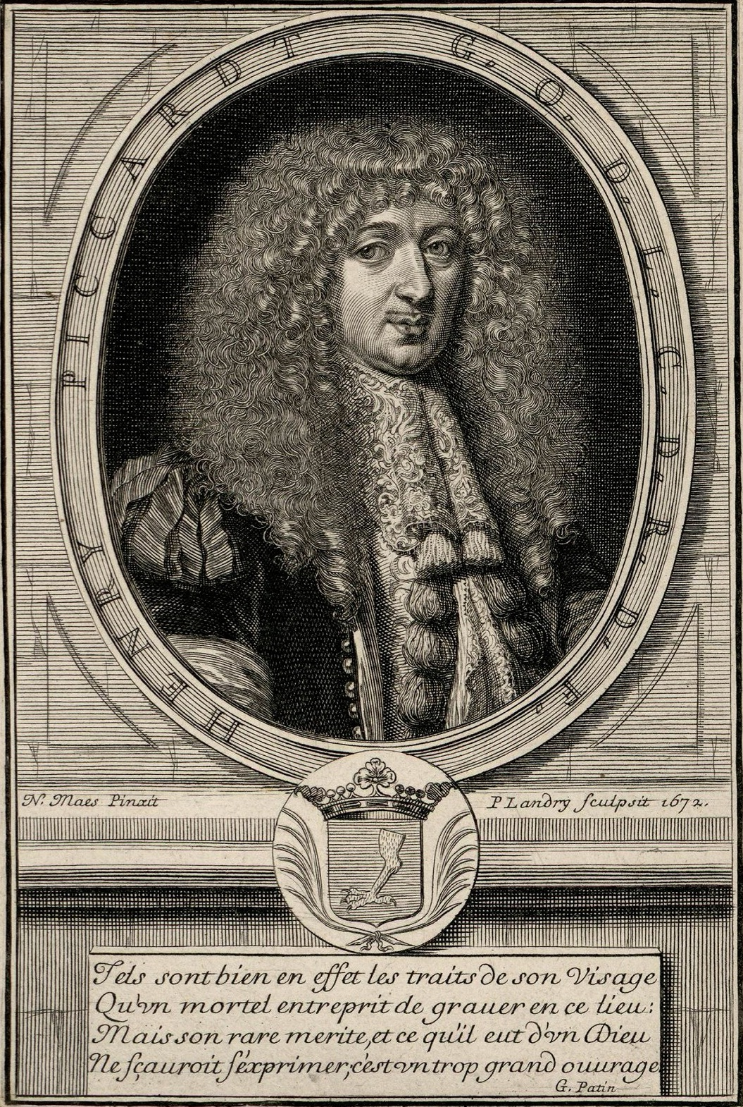 Gravure van Henric Piccardt van Pierre Landry naar een schilderij van Nicolaes Maes. Het kwatrijn is van de hand van Guy Patin.